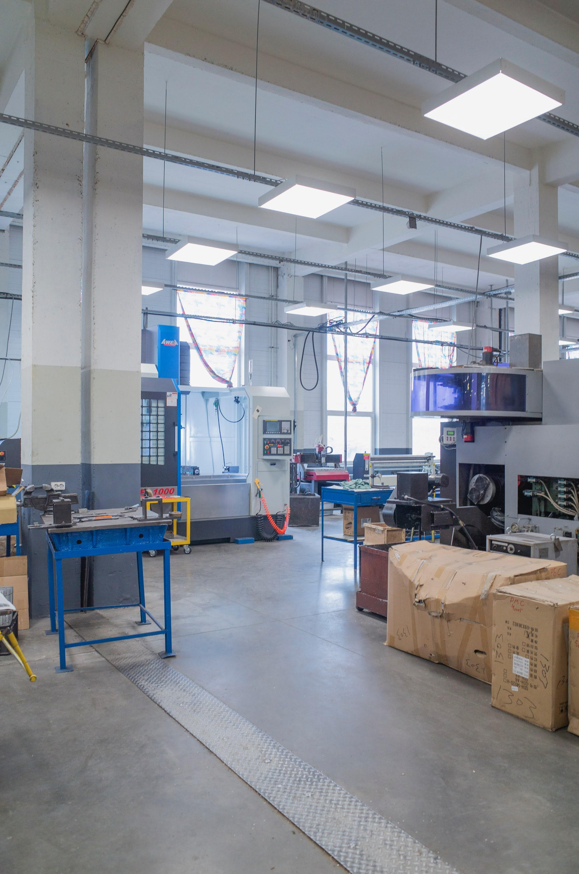 Фото: Олег Шатров